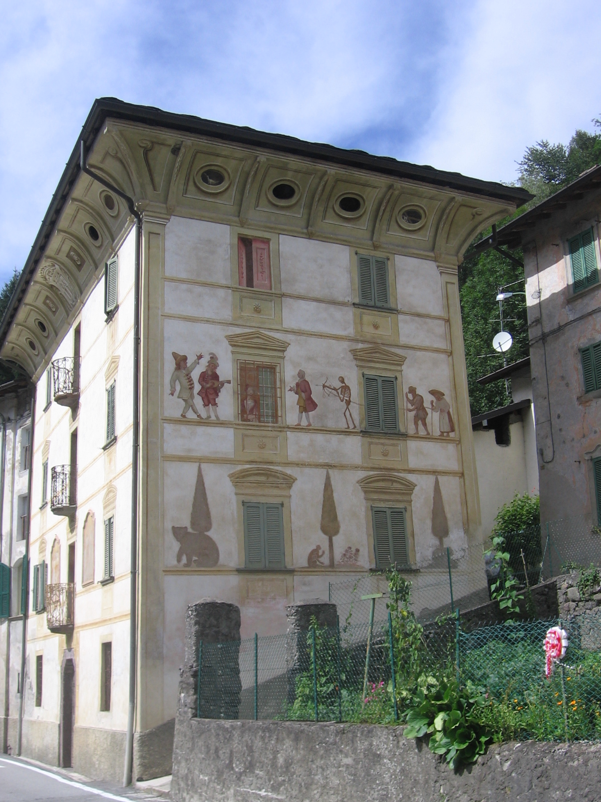 Cassiglio, Bergamo, Italy